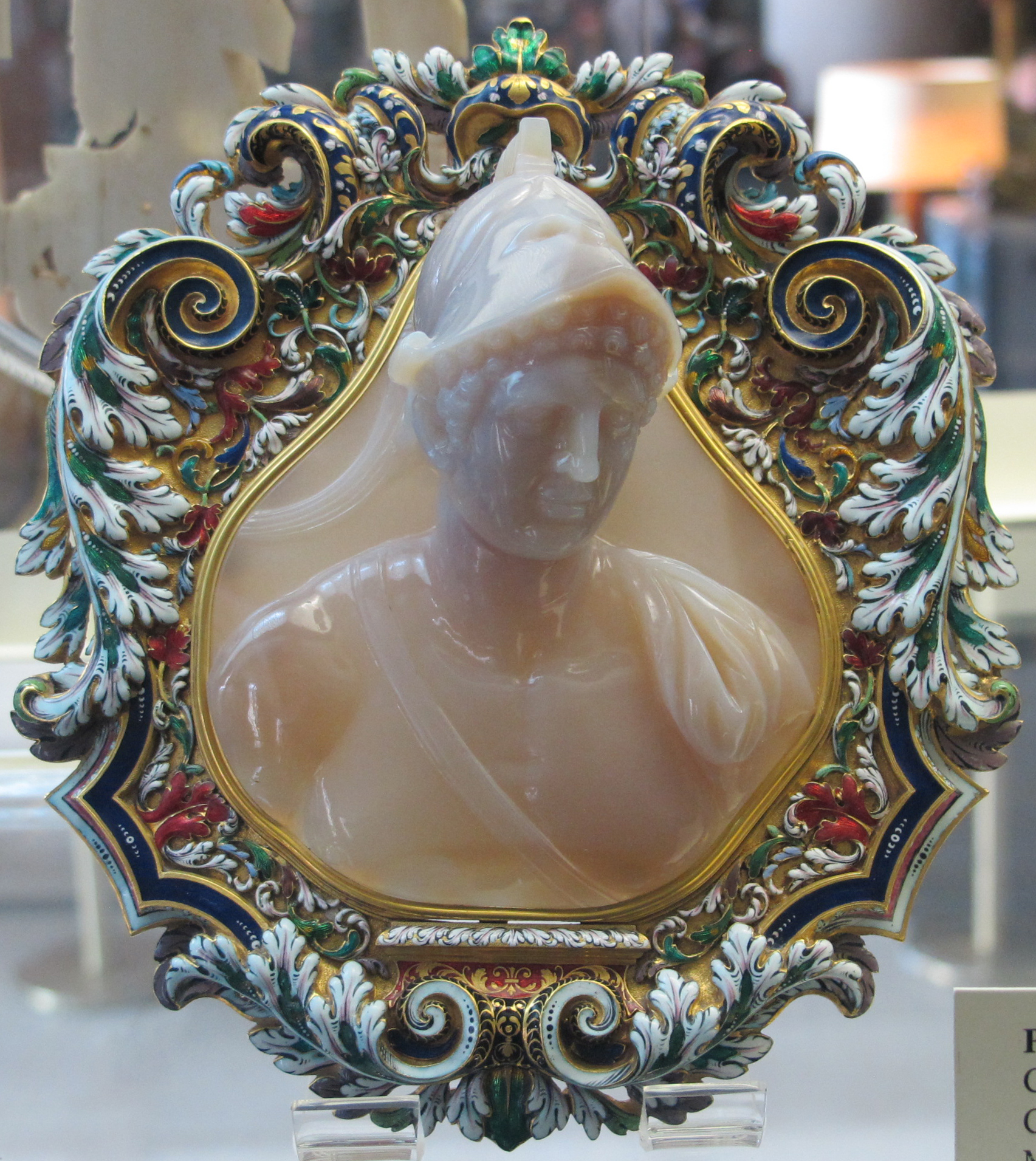 Arte ellenistica, tolomeo II assimilato ad alessandro magno